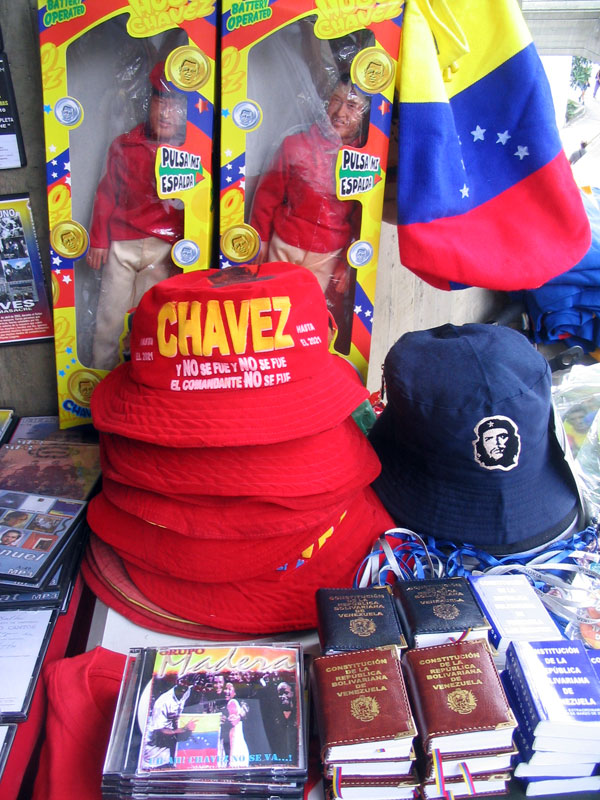 Artículos comerciales sobre Hugo Chávez